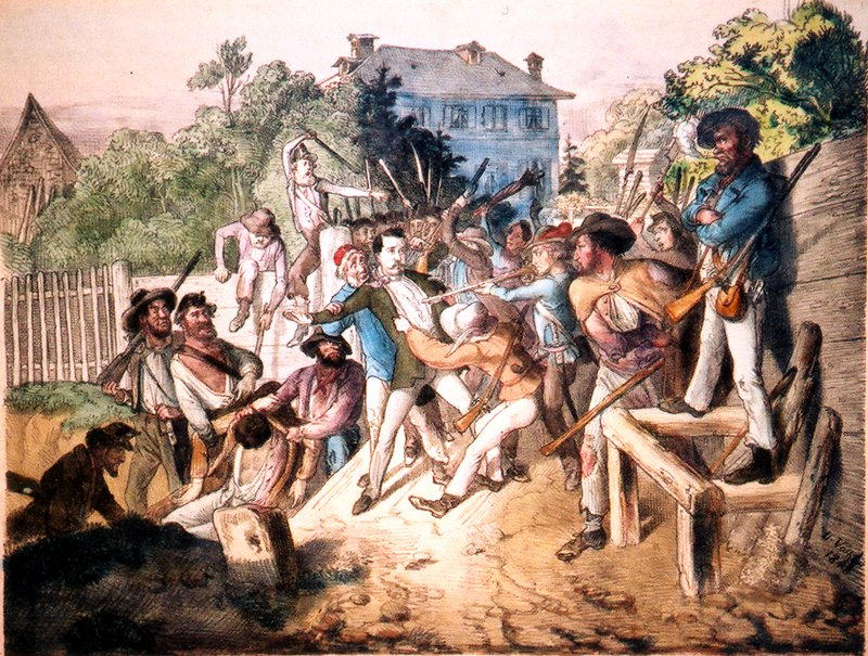 Ermordung der Abgeordneten Hans von Auerswald und Felix von Lichnowsky. Nach einer Vorlage von Johann Wilhelm Völker (1812-1873). Aus einer Folge: Scenen aus den Ereignissen des 18. September in Frankfurt/M. Druck und Verlag: Edmund Gustav May, Frankfurt/M; Lithographie, koloriert